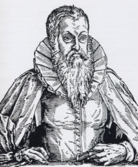 Hans Staden, aus: H. J. Winkelmann, Der Amerikanischen Neuen Welt Beschreibung, Oldenburg 1664